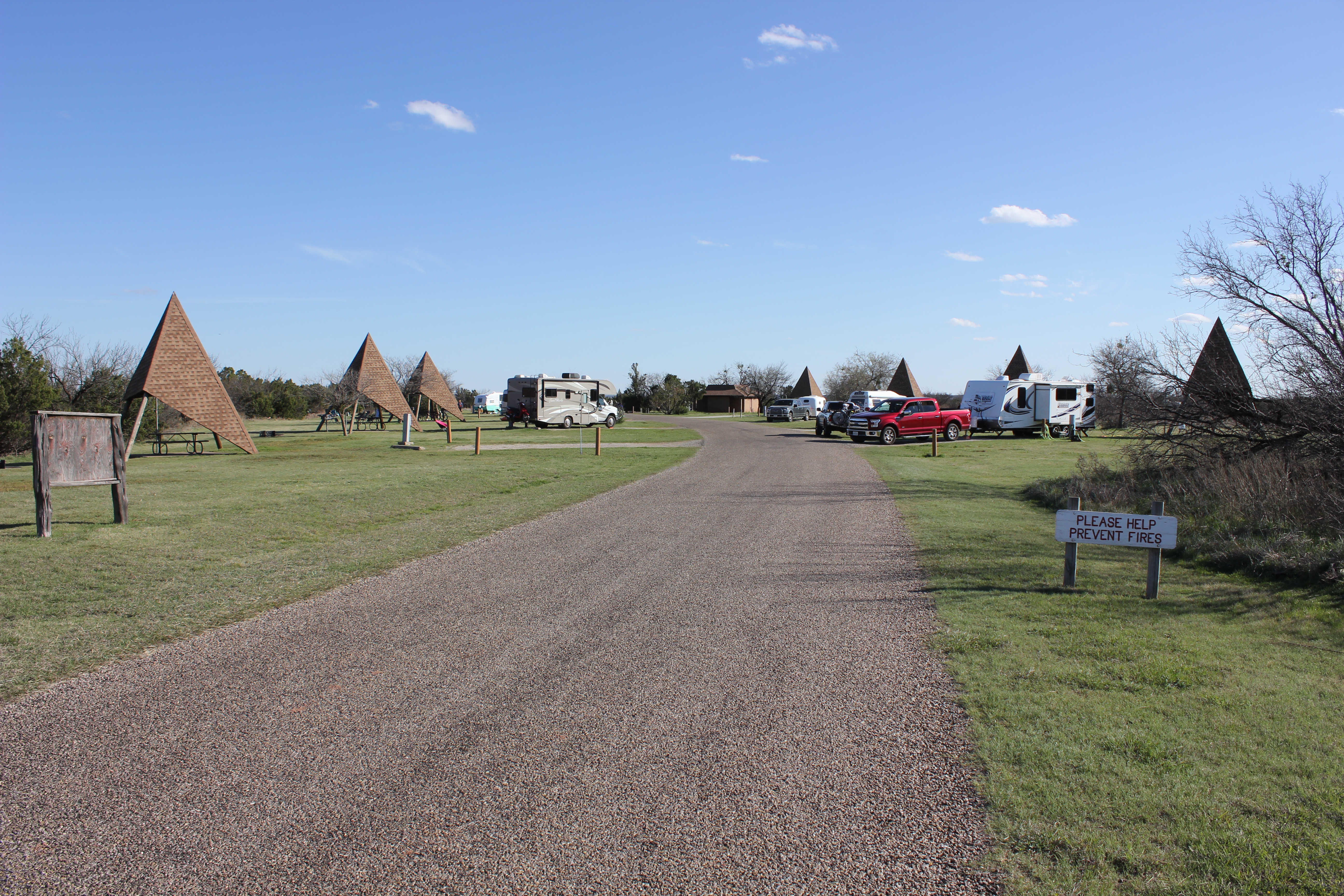 Copper Breaks State Park.